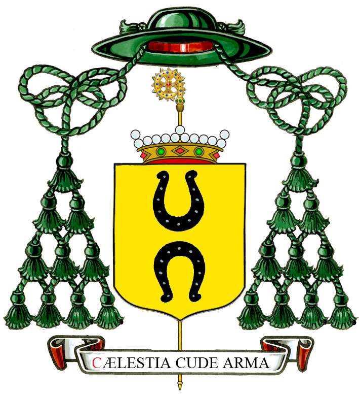 Wapenschild van Jan Baptist de Smet